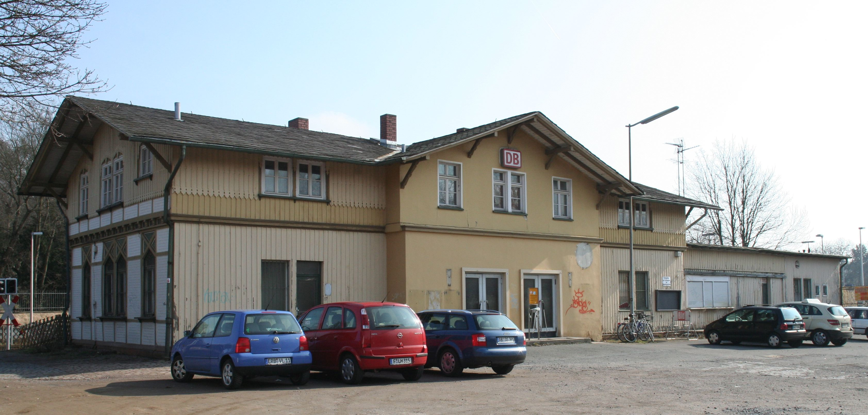 Empfangsgebäude Bahnhof Darmstadt Ost